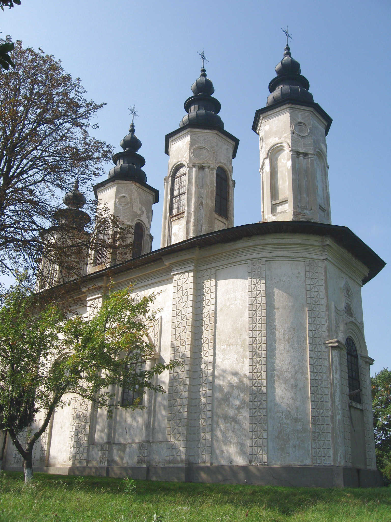 Biserica din Poiana Răftivanului